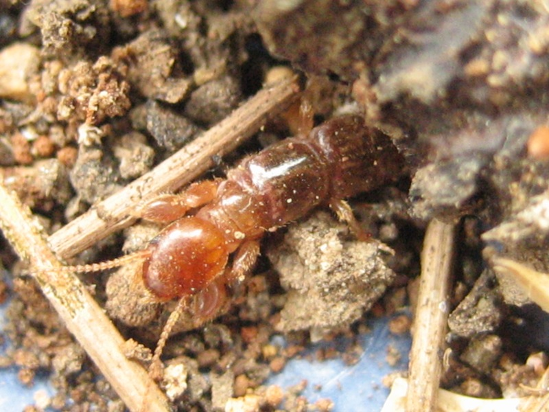 Pink Webspinner (Haploembia solieri), Davis, CA.